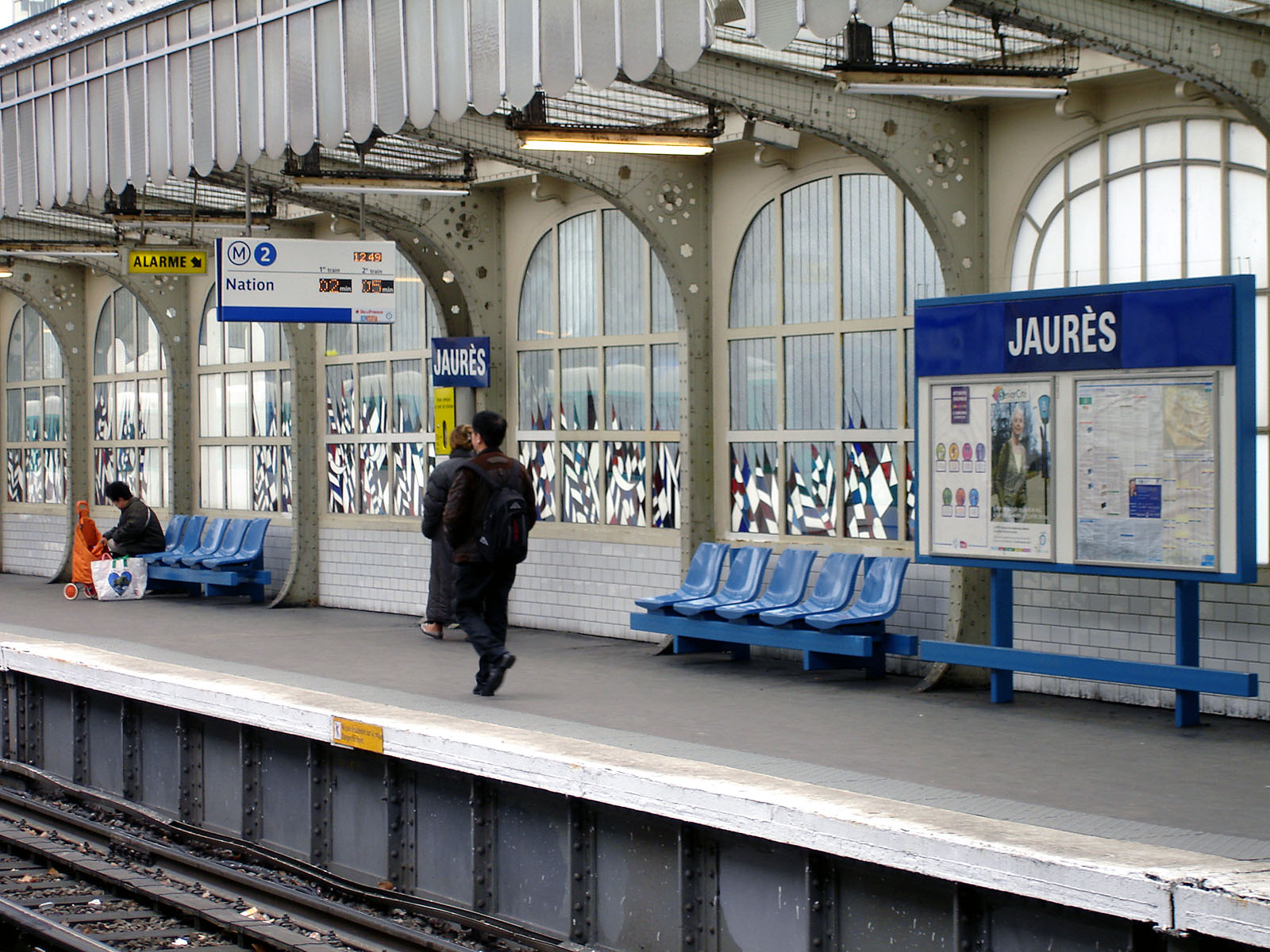 Joseph-André Motte (Français, 1925-2013): siège "Motte", RATP 1973, coque en tôle 10/20 emboutie et émaillée sur rails métalliques, station Jaurès de la ligne 2 du métro de Paris, France.